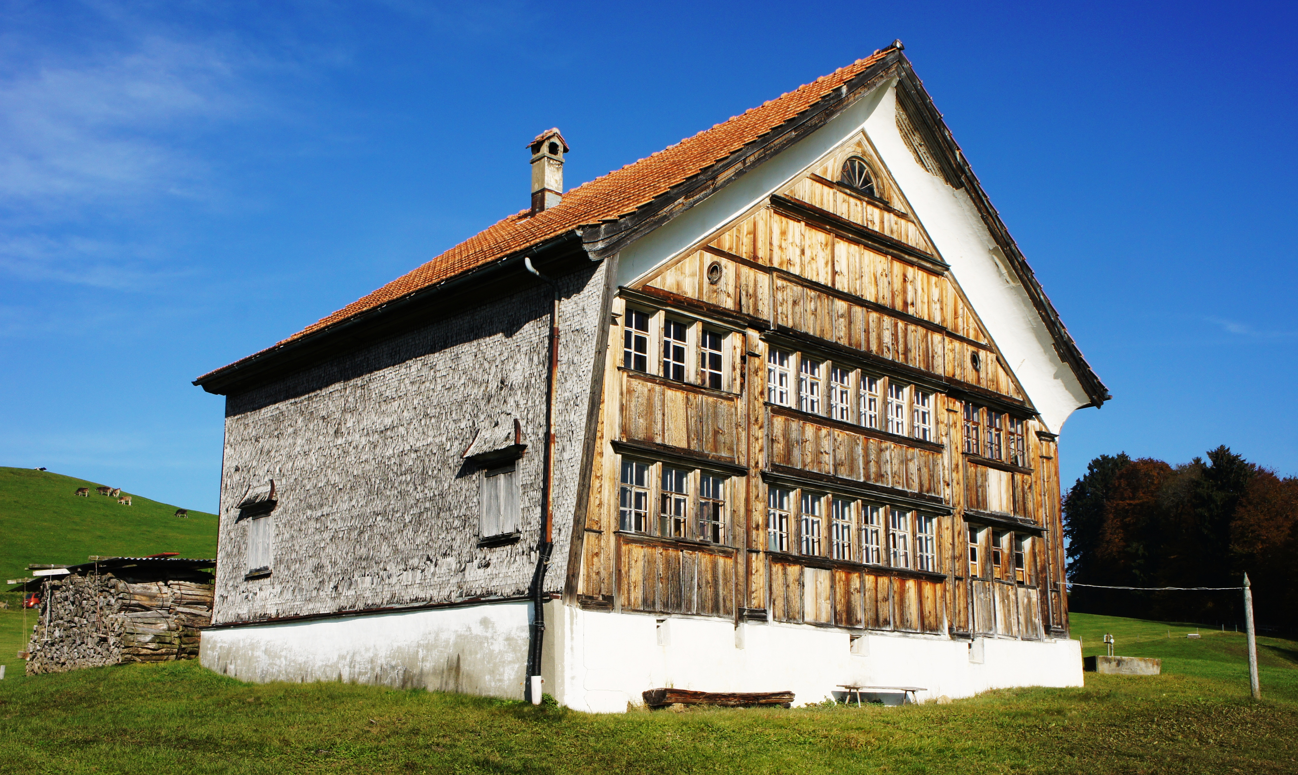 Blick von Südwesten auf Horersjokelis Wohnhaus, das mitten in einer Wiese unterhalb der Lehnstrasse nördlich von Appenzell steht. Das Kellergeschoss ist gemauert, der obere Teil ein Holzbau. Die Westseite (links) ist mit Holz-Schindeln verkleidet. Rechts neben dem Haus steht ein Brunnen.